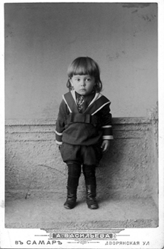 Петр Щербачев, внук Петра Алабина, сын Александра Щербачёва